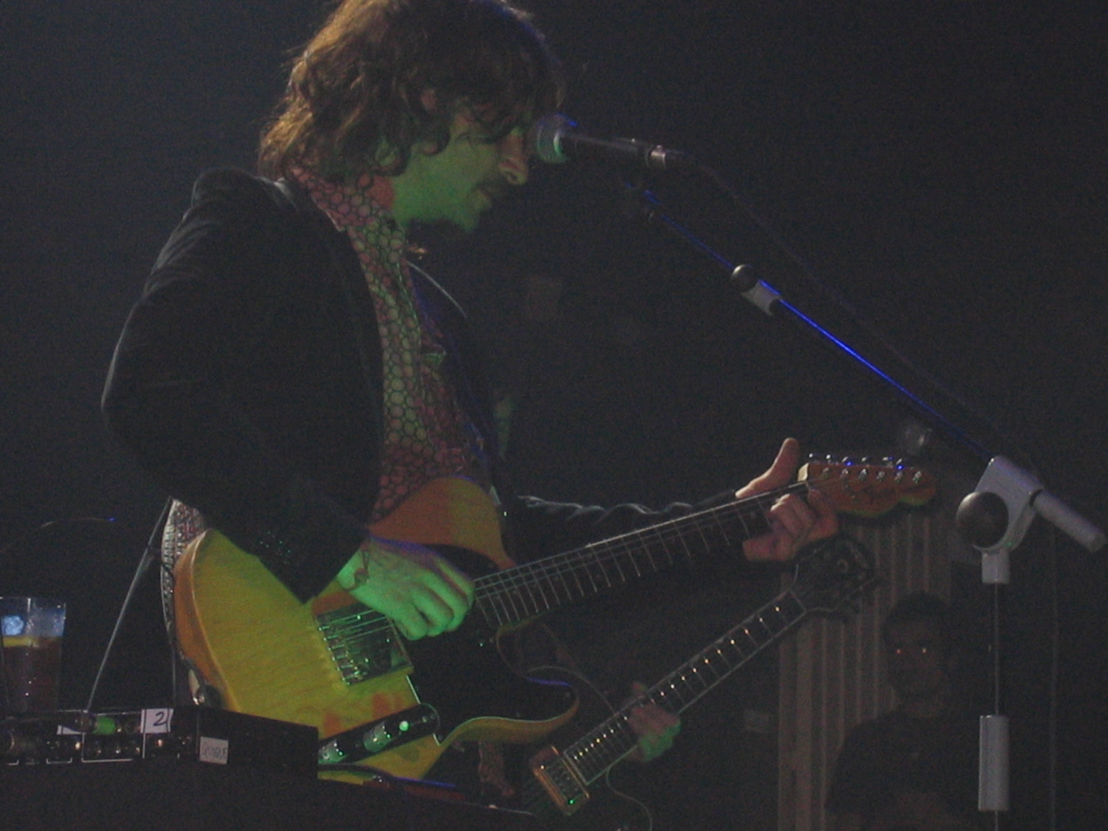 Quique González en un concierto en Granada